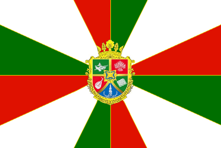 Прапор Красноградського району Харківської області України